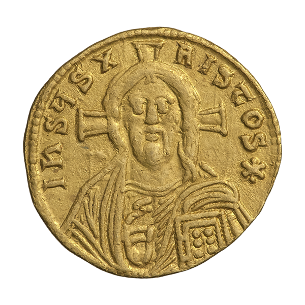 Михаил III Пьяница (842—867). Солид. Константинополь. Реверс. Иисус Христос, в фас, позади крест; правая рука поднята в жесте благословения, в левой руке Евангелие.